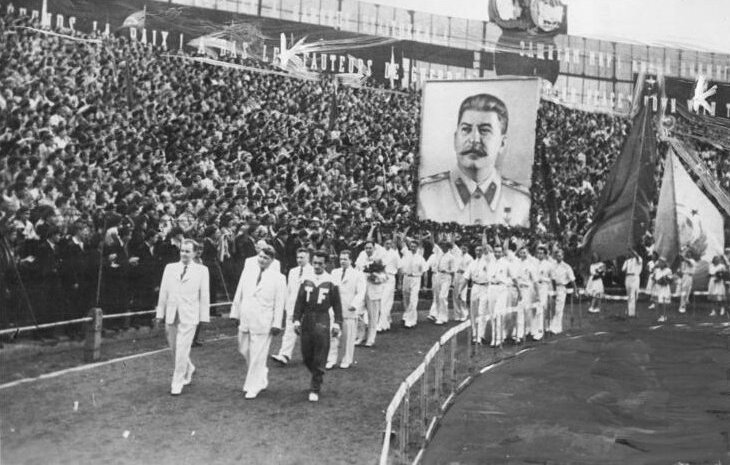 Budapest, II. Weltfestspiele, Festumzug, Komsomolzen Weltjugendfestspiele in Budapest UBz: Beifall für die Komsomolzen.Aufn:Illus 23.8.49